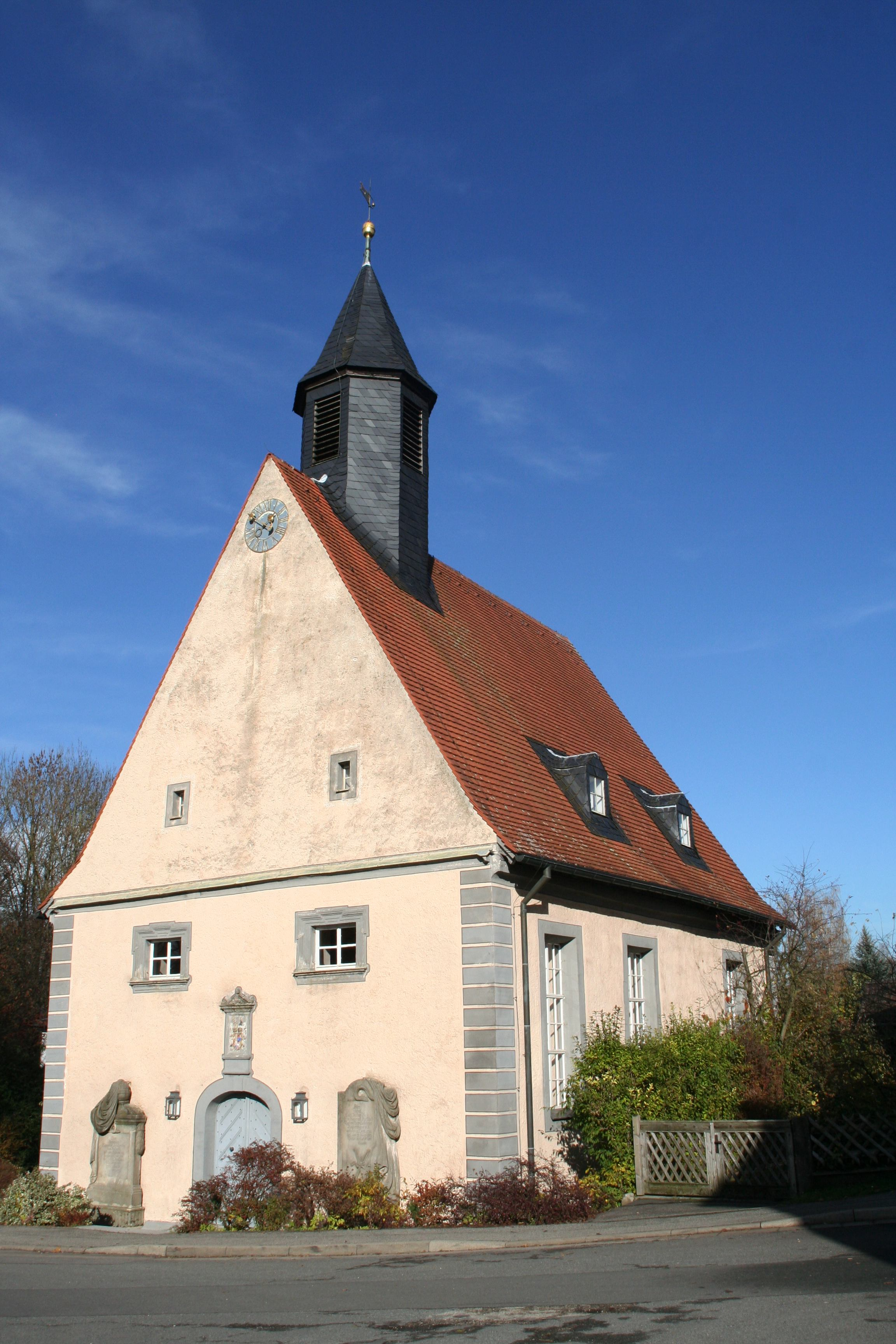 Schlosskirche in Niederfüllbach in Oberfranken Landkreis Coburg